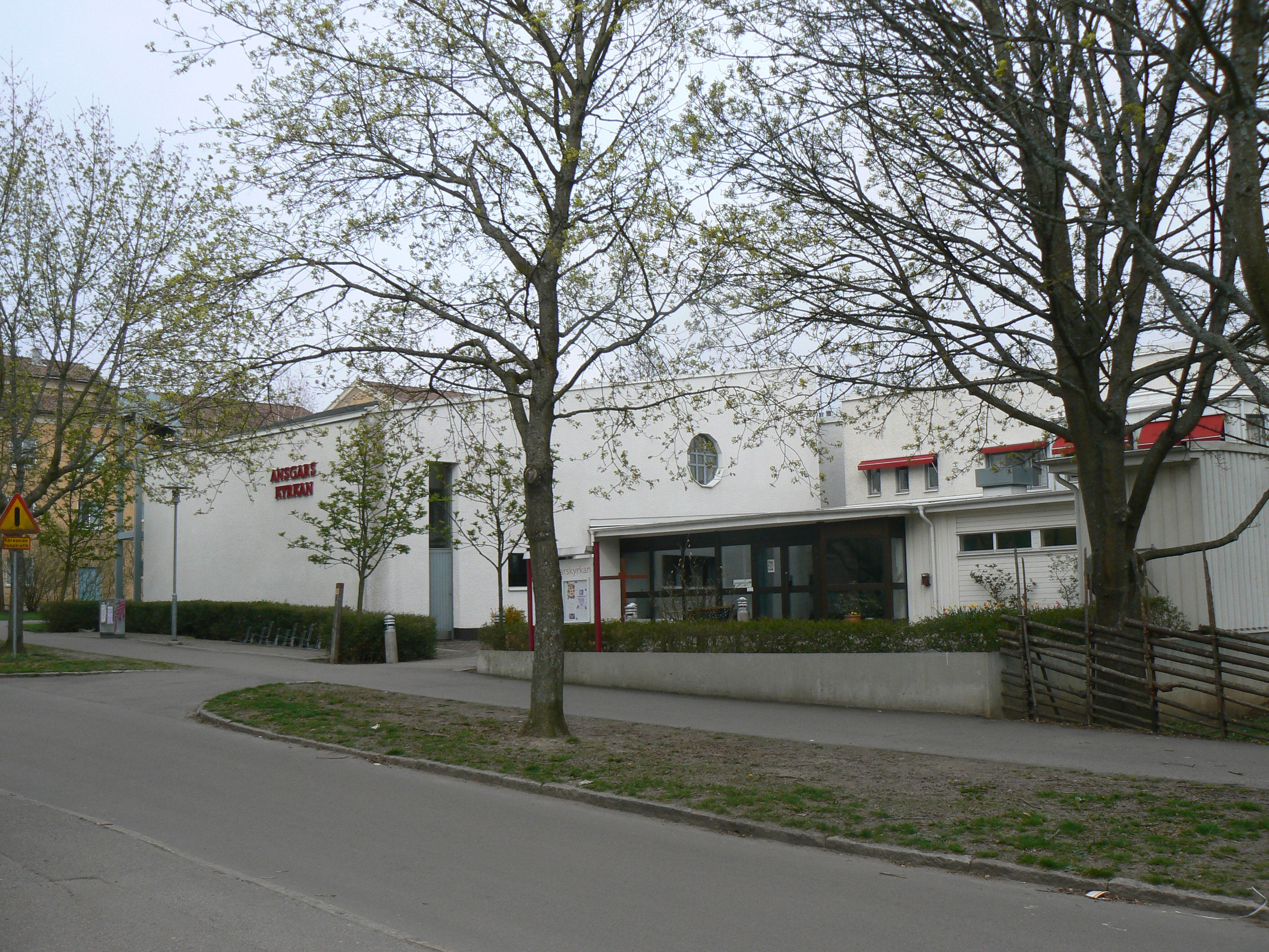 Ansgarskyrkan, Church of Sweden in Gottfridsberg parish, Diocese of Linköping.